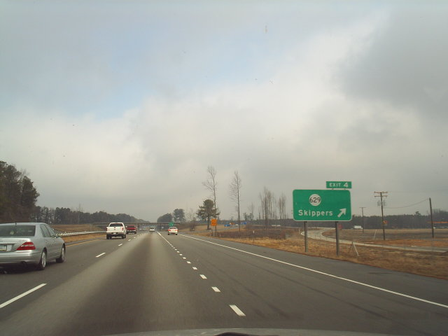 M3367S-4504